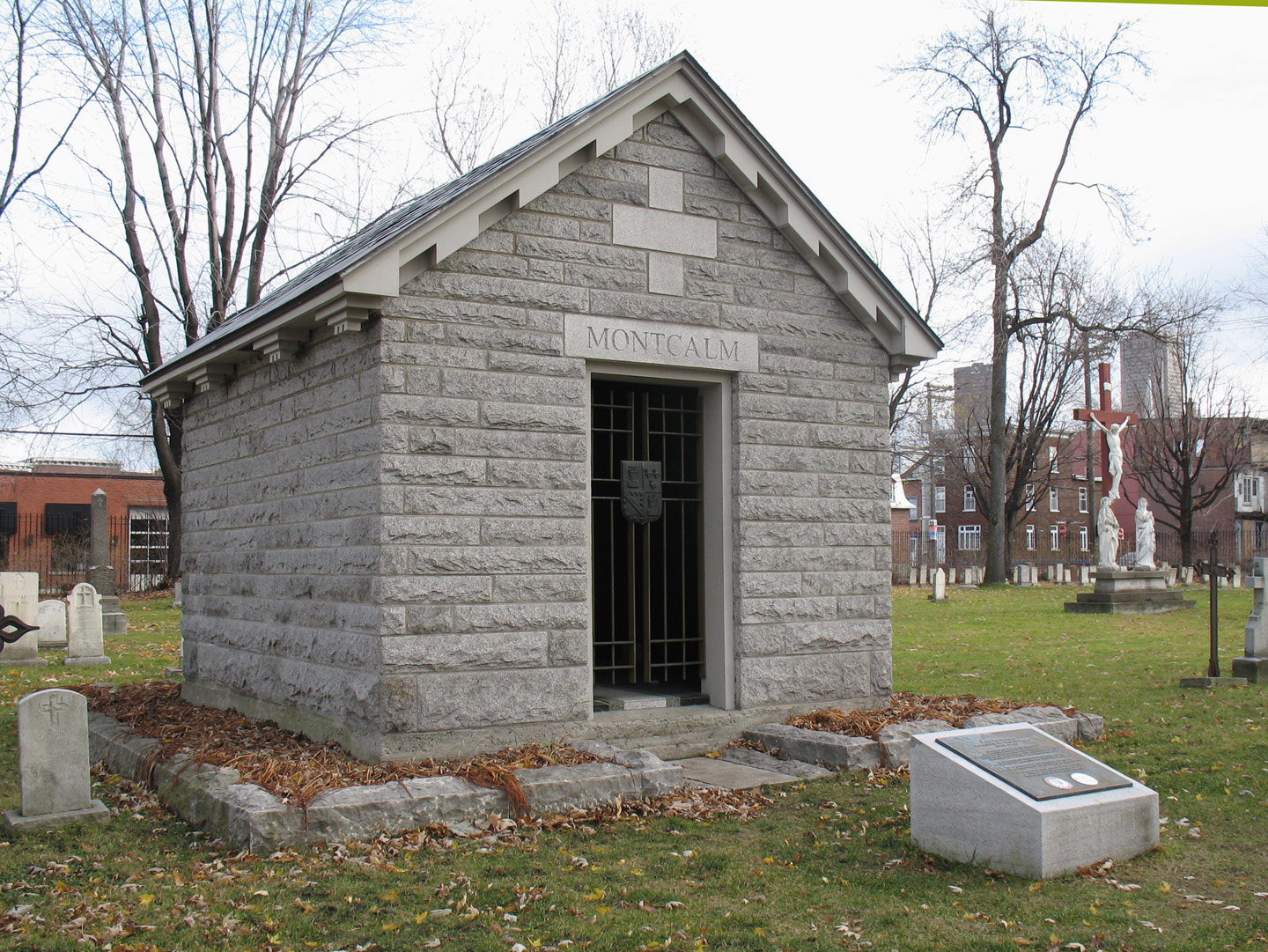 Mausolée de Montcalm à Notre-Dame-des-Anges. Municipalité de paroisse enclavée dans le territoire de la ville de Québec. Région de la Capitale-Nationale, province de Québec (Canada). Elle renferme le monastère des Augustines de Québec et l'Hôpital général de Québec. Adresse : 260, boulevard Langelier, Québec